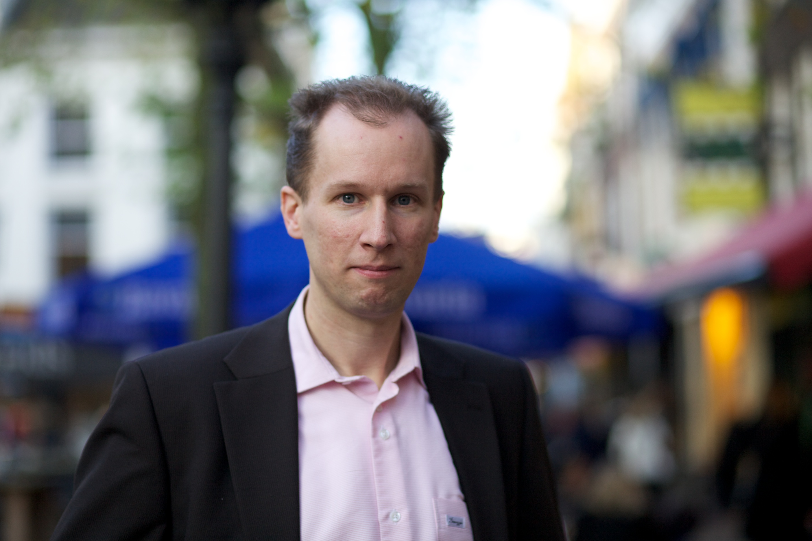 Arnoud Engelfriet bij de Wikimedia NL miniconferentie in Utrecht. (